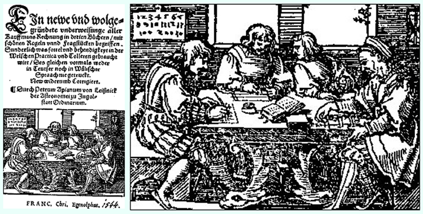 Peter Apian, Kaufmanns Rechnung, 1527: Ein Mann benutzt noch Rechenbrett und Rechensteine mit römischen Zahlen, ein anderer rechnet bereits schriftlich mit arabischen Zahlen.